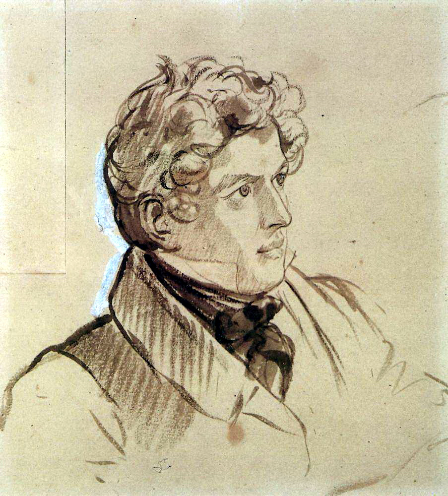 Автопортрет. 1830-33